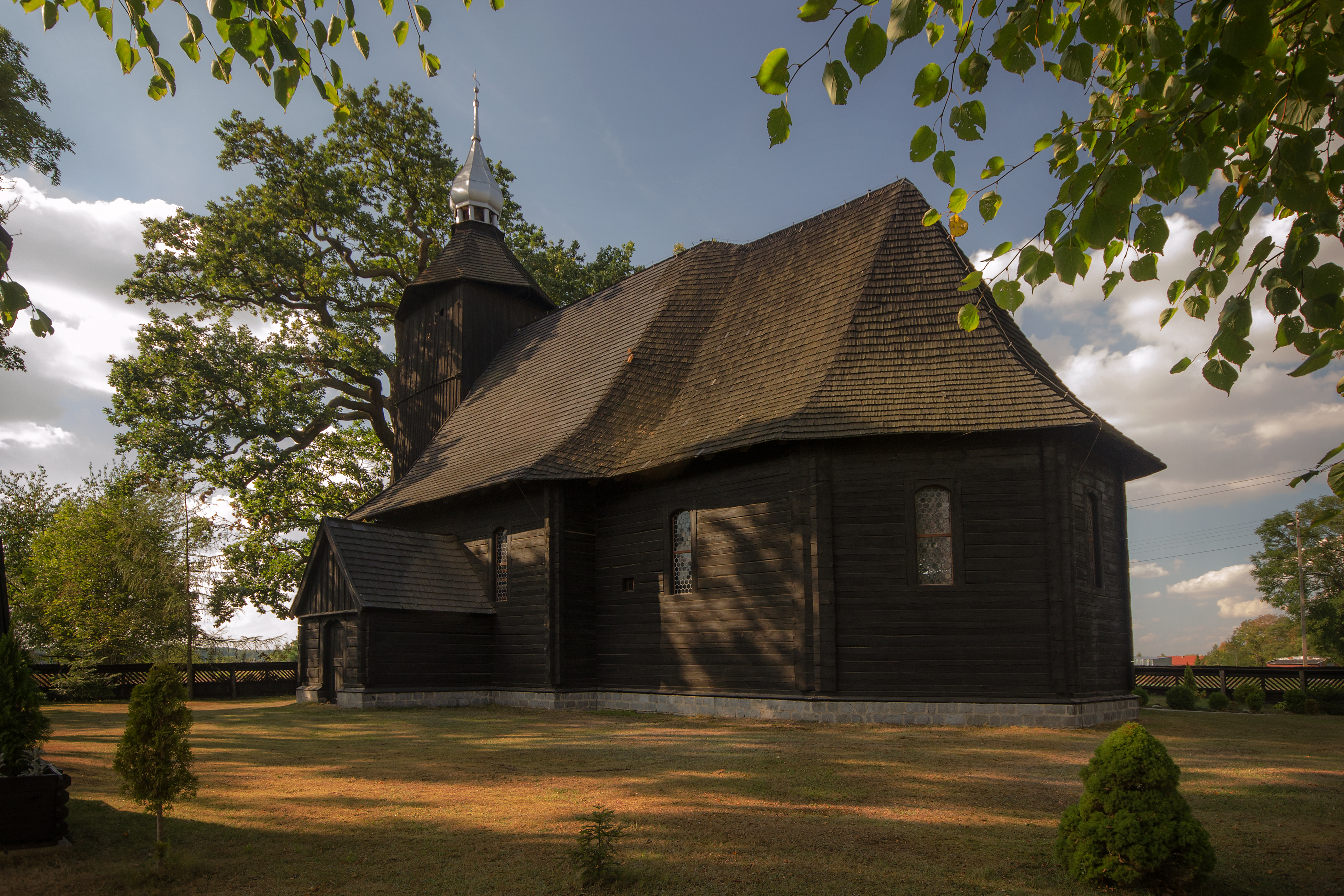 Wierzbica Dolna, kościół ewangelicki, ob. rzym.-kat. fil. p.w. Podwyższenia Krzyża, drewn., 1698, 1939